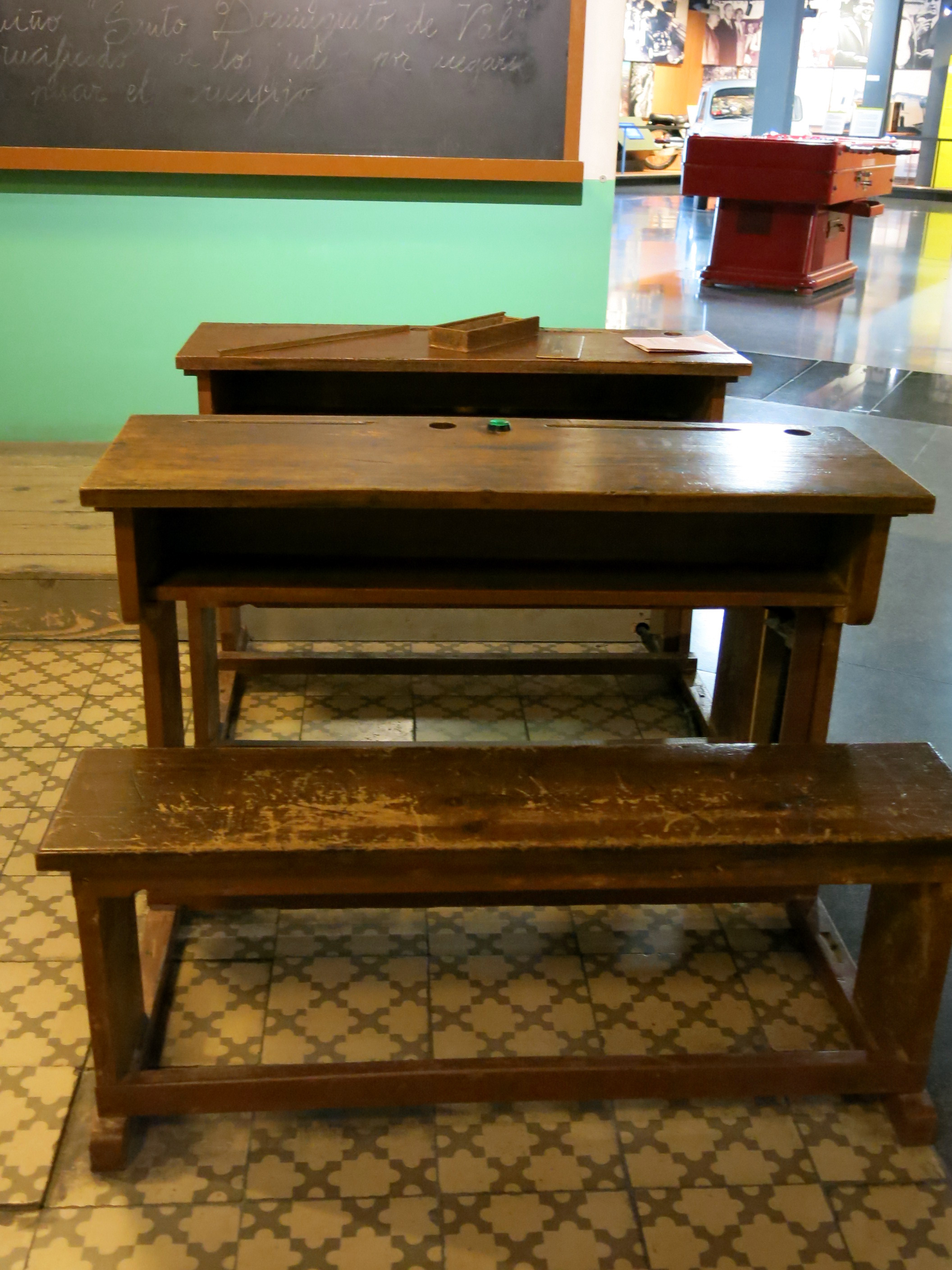 Magatzems generals del Dipòsit (Barcelona). Inclouen el Museu d'Història de Catalunya